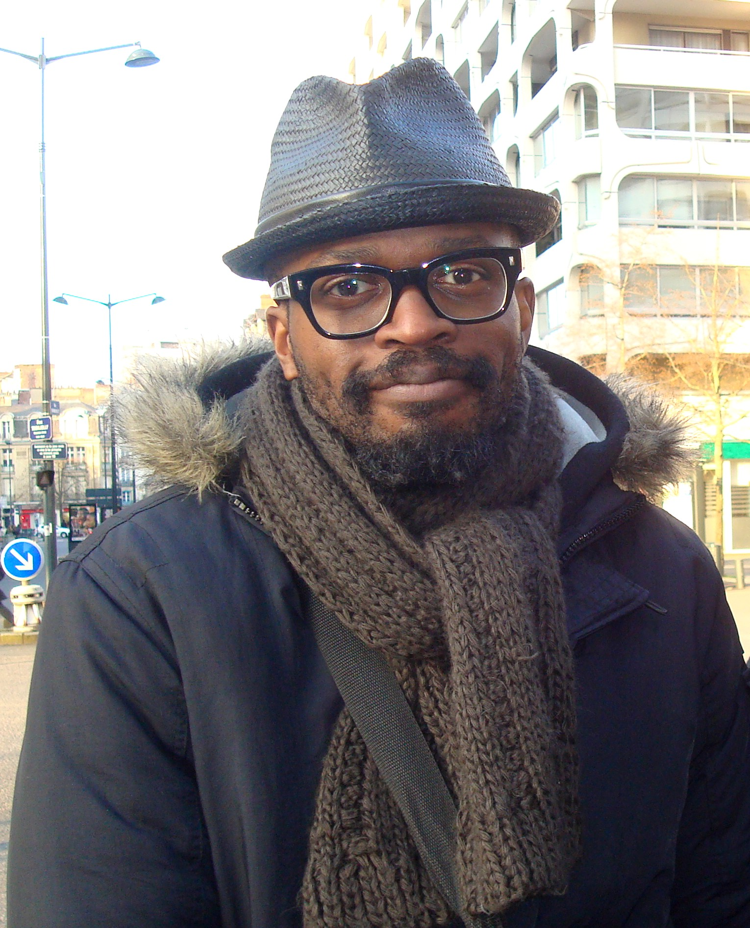 Le chanteur Tété à Rennes en 2010.